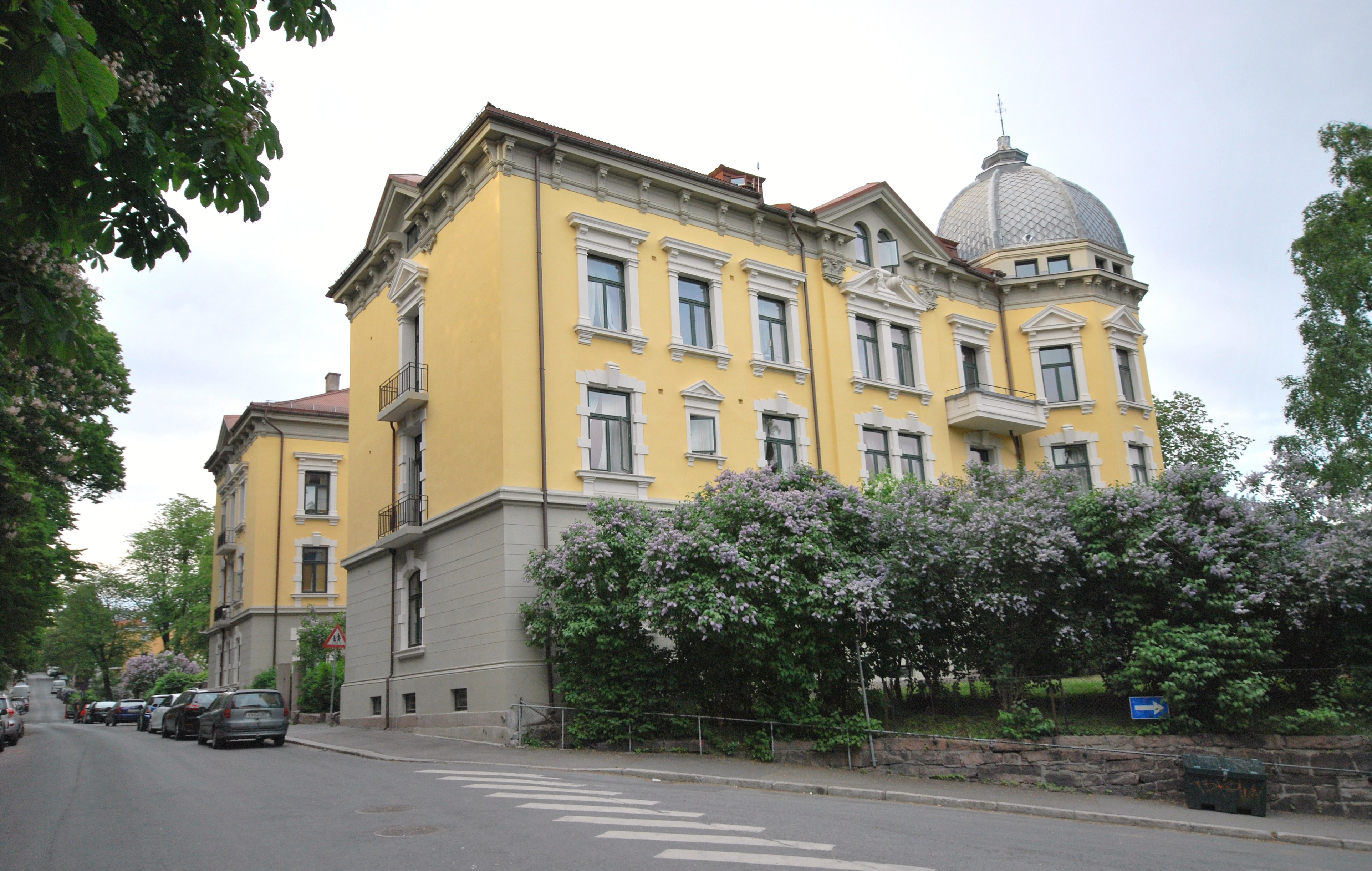 Geitmyrsveien 11-13 i Oslo. "Studiehjemmet for unge piker" opprettet av professor Kristine Bonnevie i 1916.